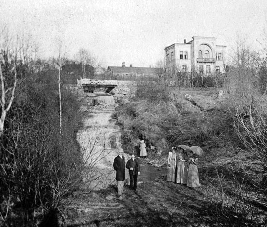 Hovinbekken rundt 1890. Øvre Foss renner fra Galgeberg ned mot Klosterenga. Murhuset på bildet står fortsatt, og har adresse Galgeberg 2.